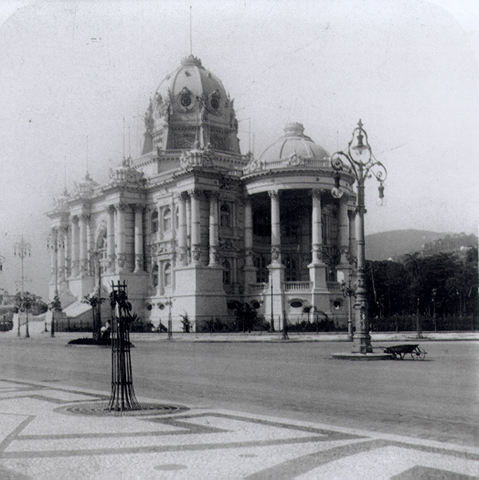 Conde de Agrolongo. O Palácio Monroe, Rio de Janeiro RJ , ca. 1908 estereoscopia Coleção Fichel David Chargel